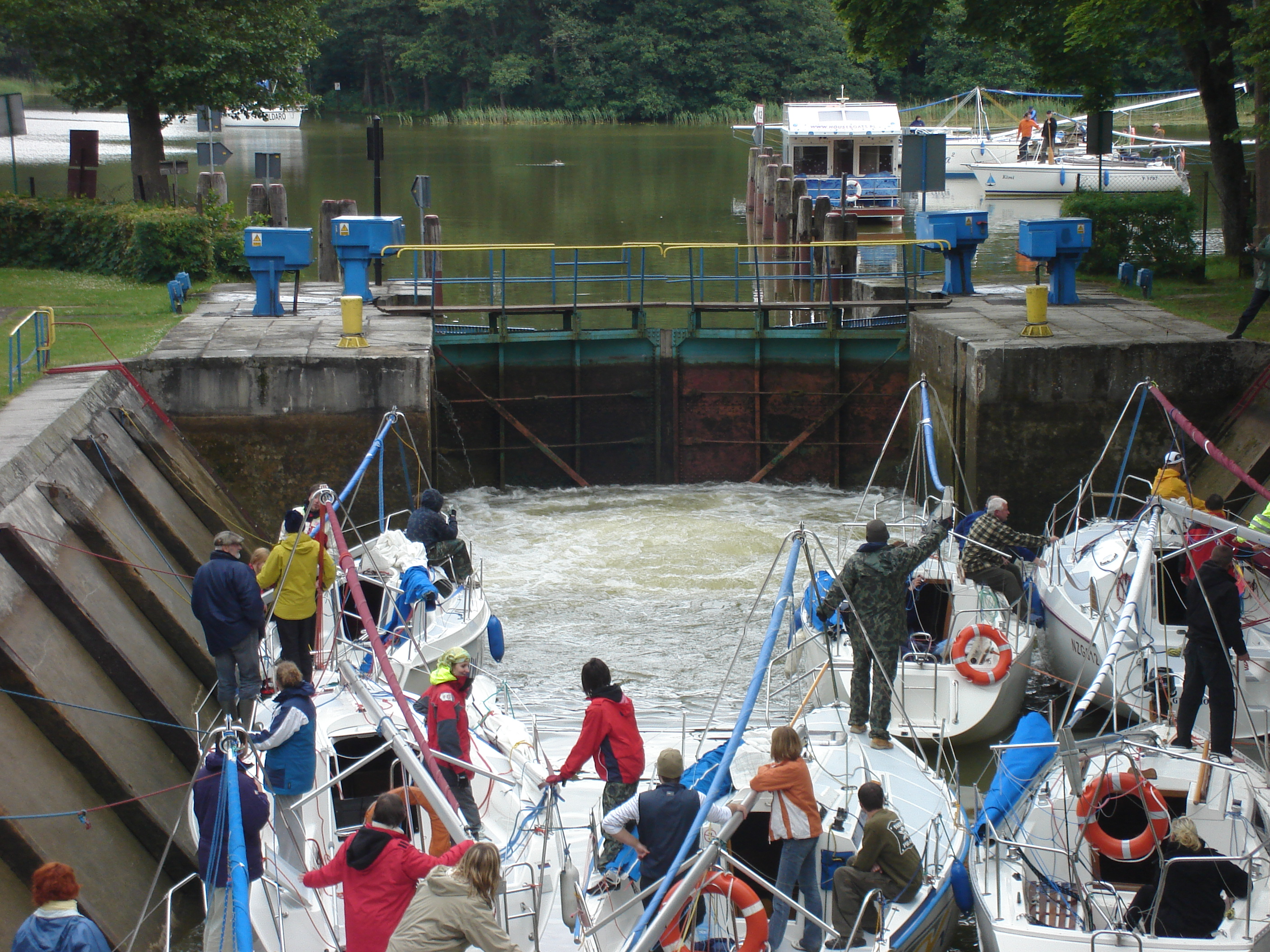 Śluza Guzianka. Napełnianie śluzy